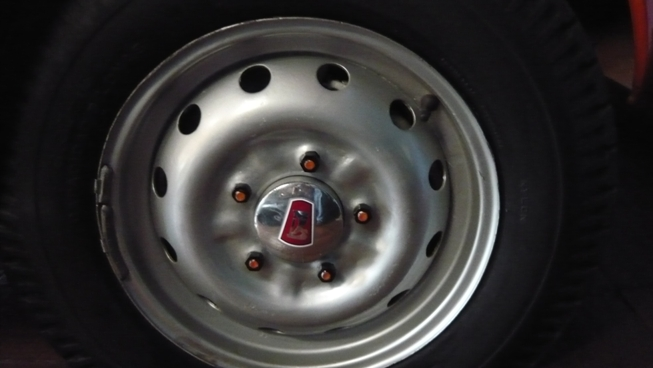 lada niva 19790 rin tapacubo